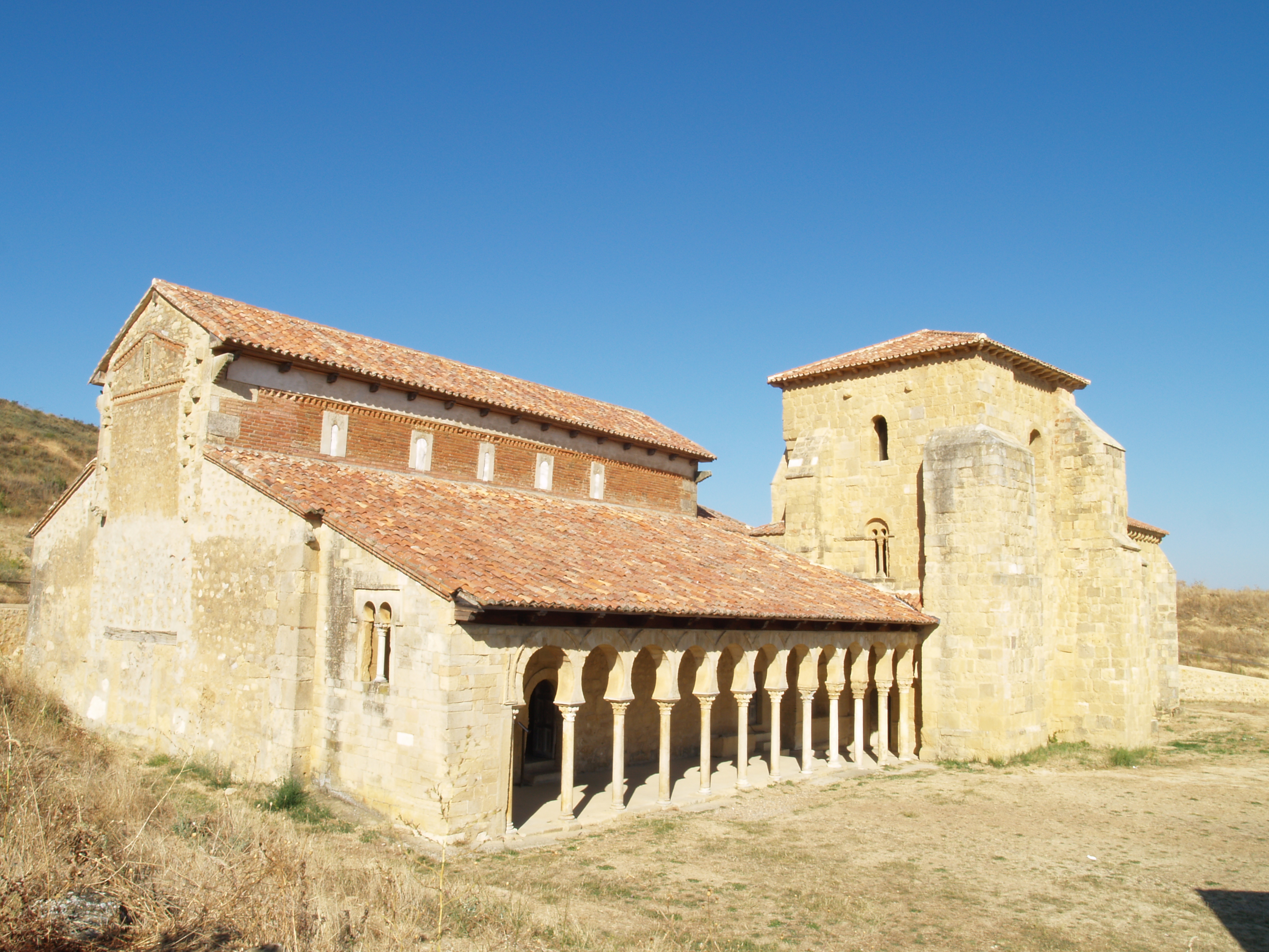 San Miguel de Escalada. Vista lateral desde el lado Oeste.